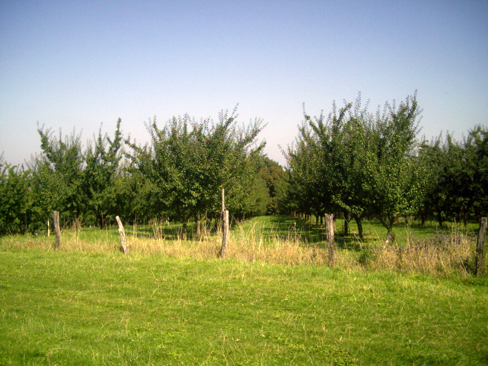 Verger de mirabelliers à Vigneulles (54)